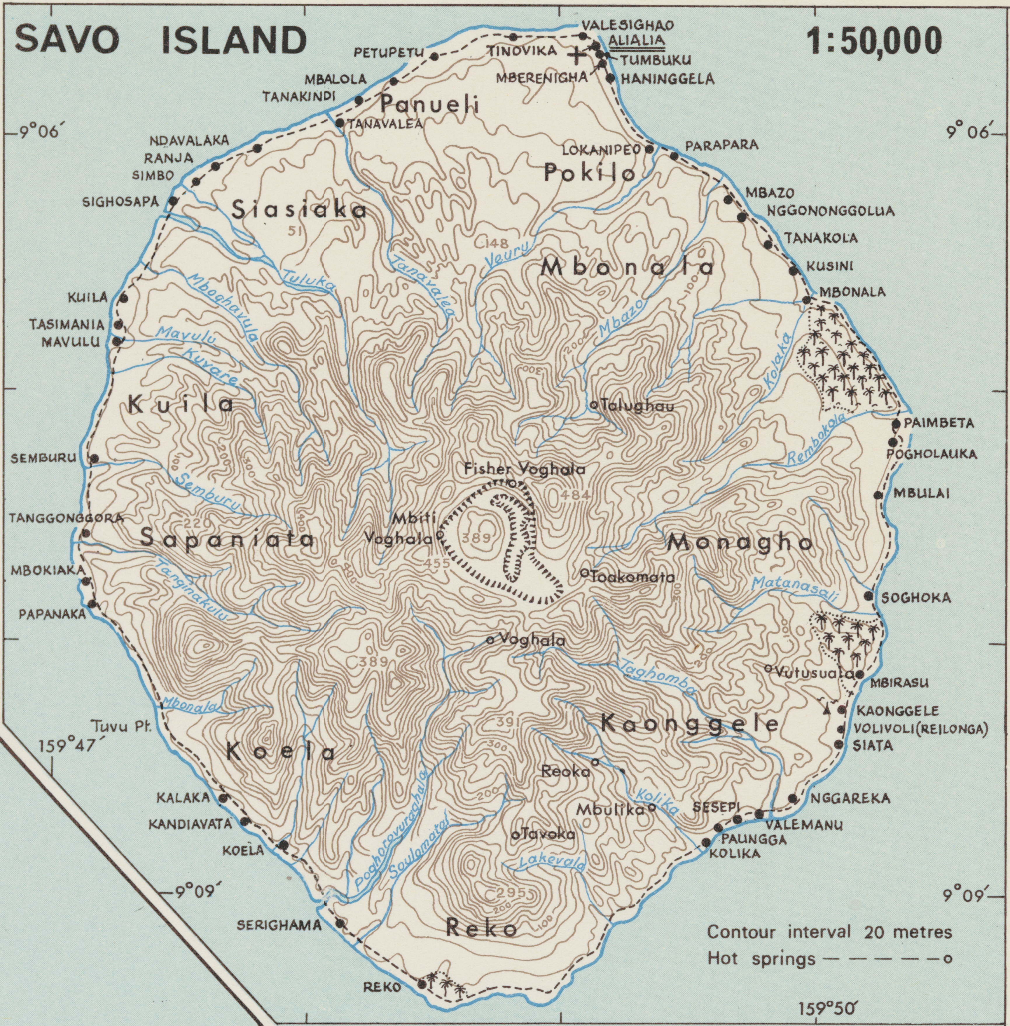 Topographic map of Guadalcanal Island, inset of Savo Island, Solomon Islands, Melanesia, South Pacific Ocean